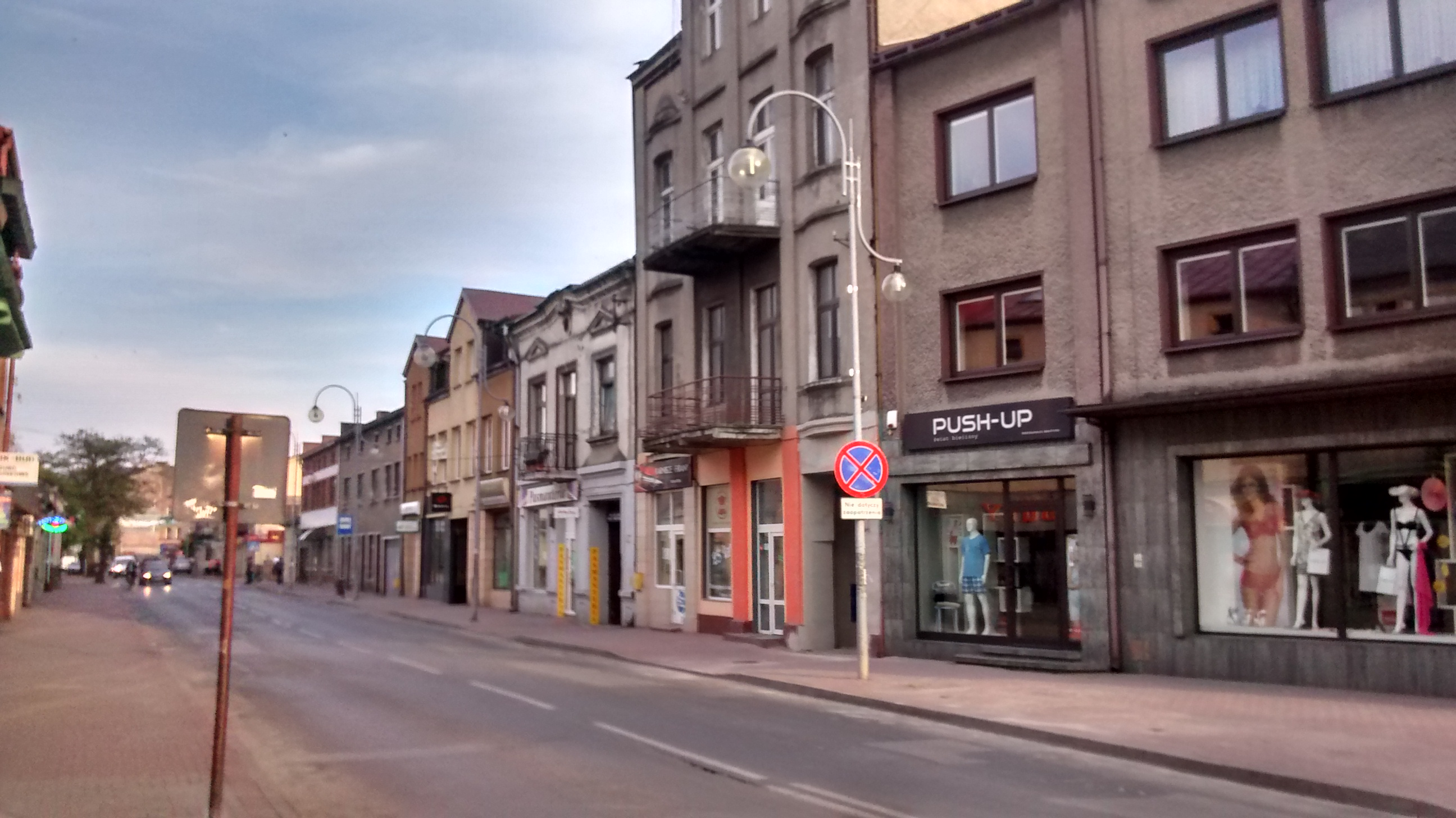 Radomsko - centrum miasta (ul.Reymonta)